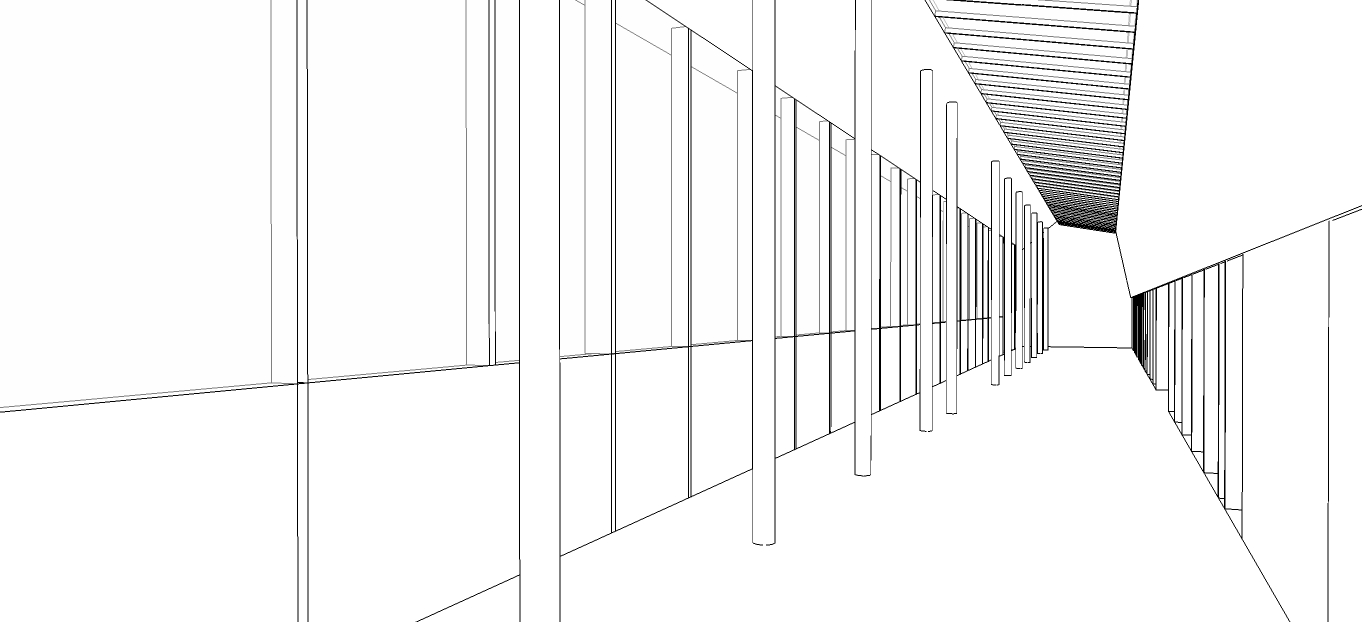 Template:Screenshotcopyrighted